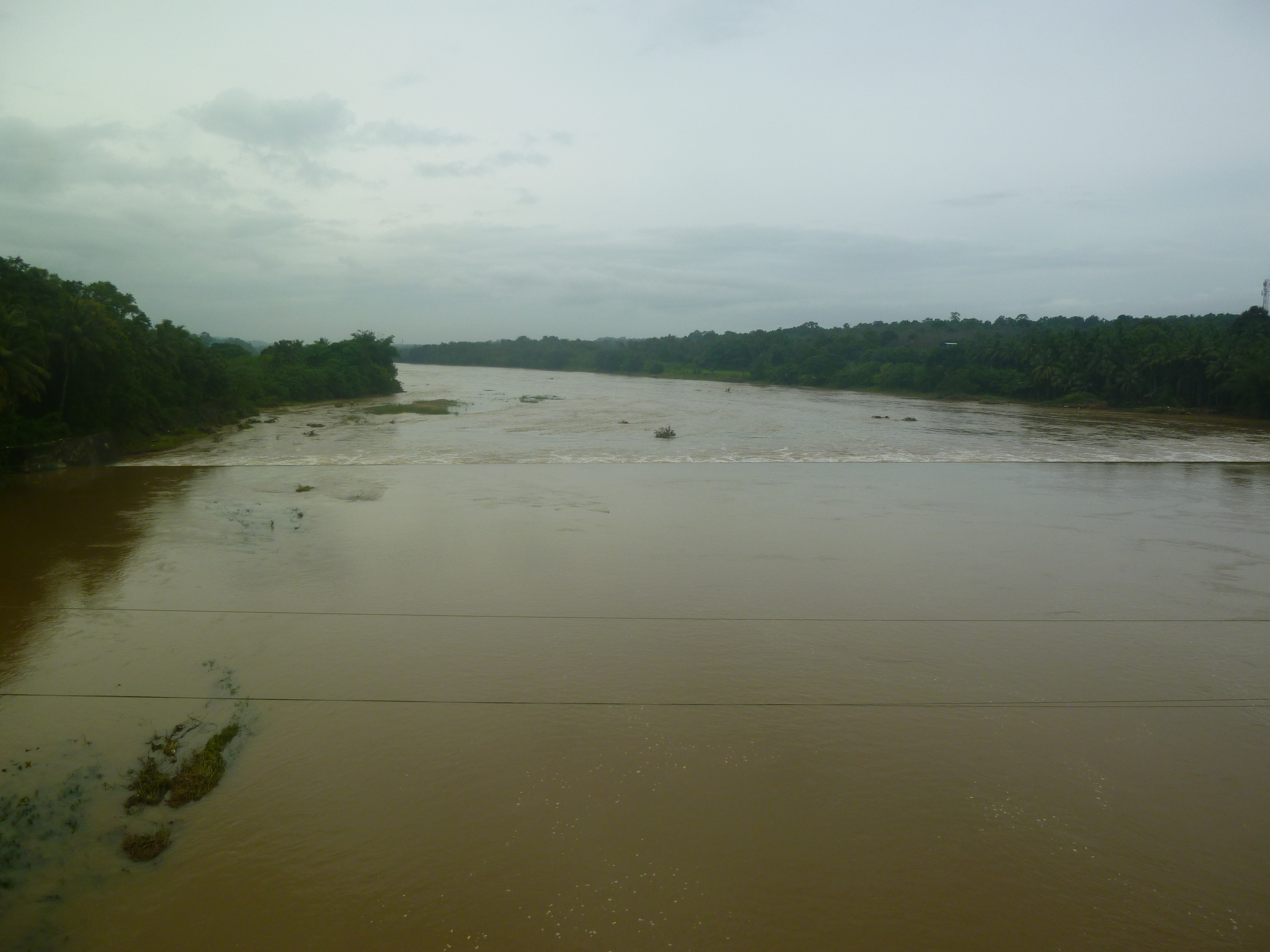 2018 ൽ ജലനിരപ്പ് ഉയർന്നപ്പോൾ ഭാരതപ്പുഴയുടെ തിരുവില്വാമല പാമ്പാടിയിൽ നിന്നുള്ള കാഴ്ച്ച